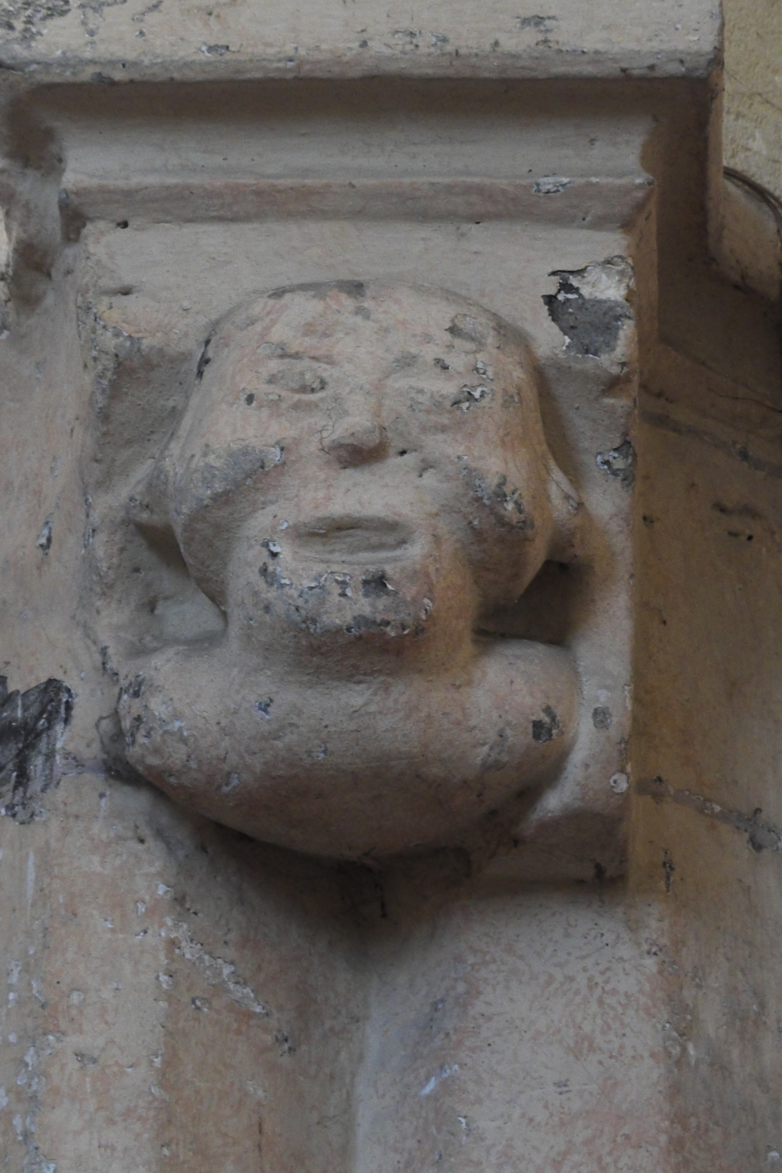 Katholische Pfarrkirche Sainte-Geneviève in Héricy im Département Seine-et-Marne (Île-de-France/Frankreich), romanische Konsole im Turmuntergeschoss